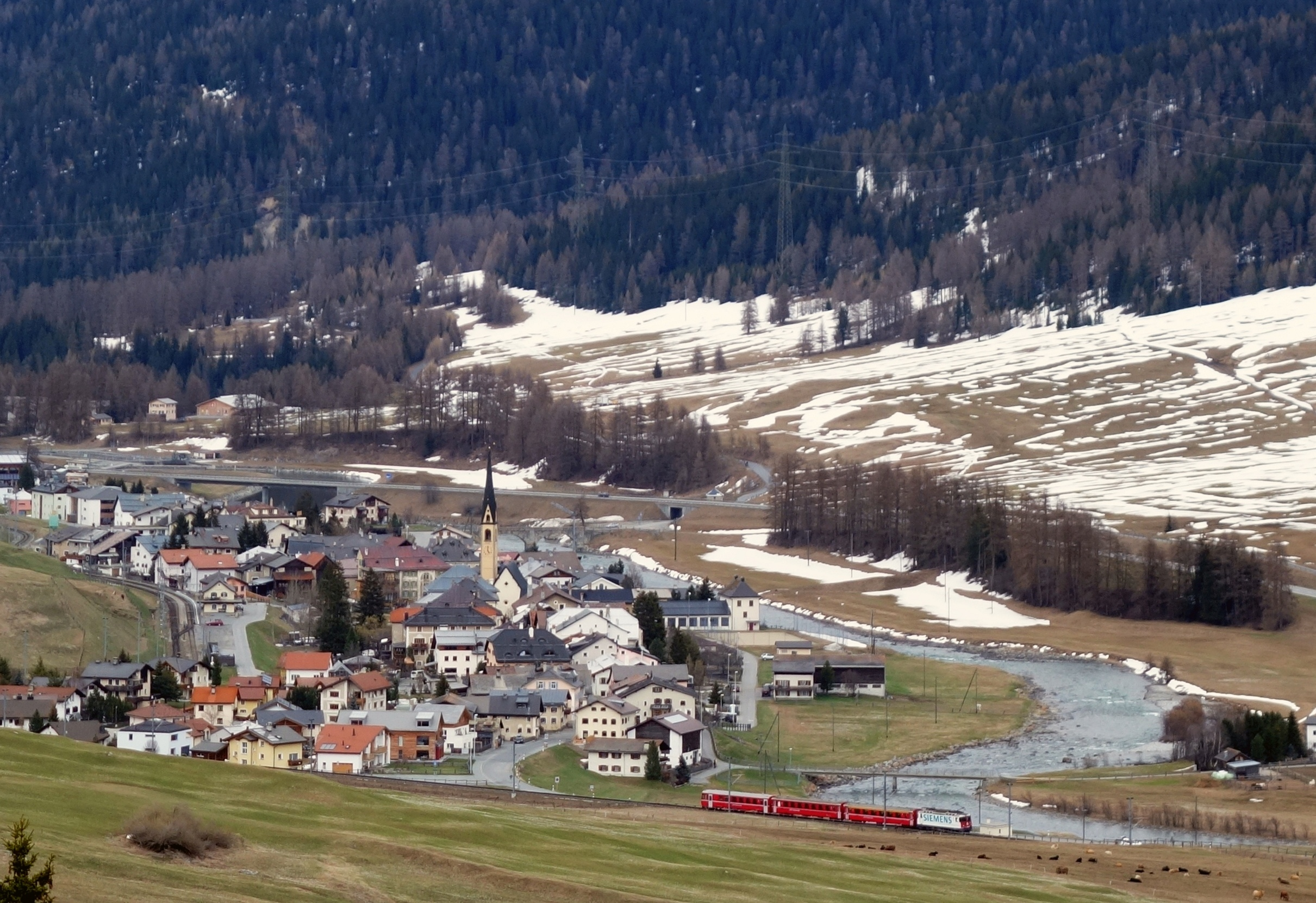 S-chanf, gesehen von den Berghängen oberhalb von Zuoz. Im Vordergrund ein Zug der Rhätischen Bahn, im Hintergrund der Inn.